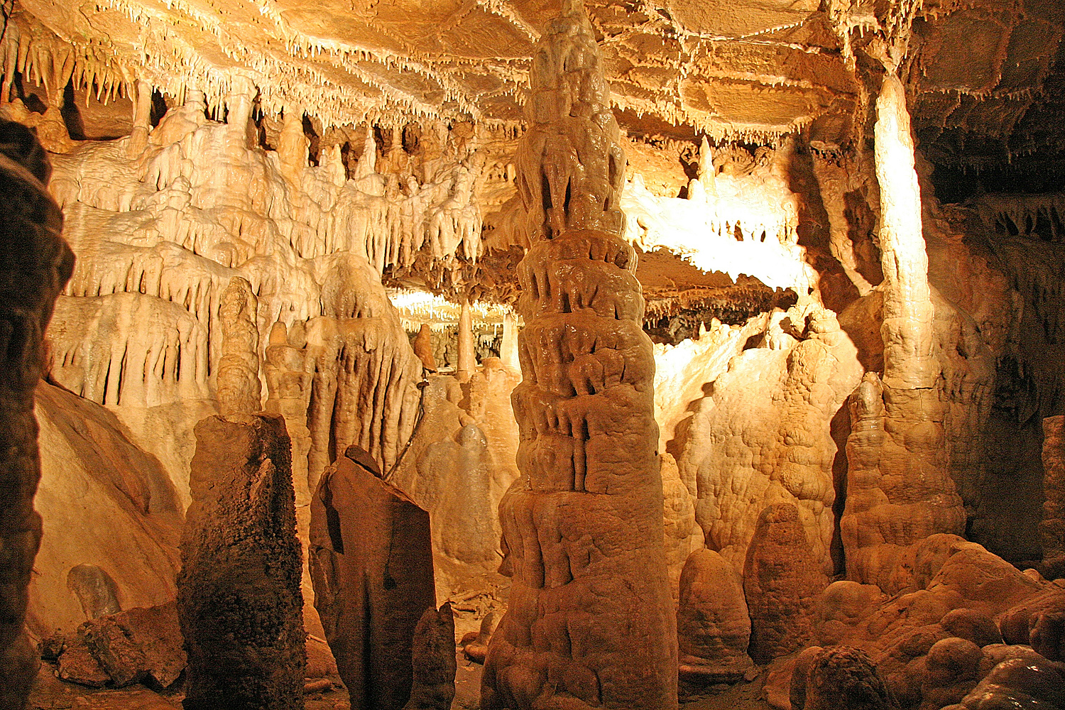 Jeskyně Balcarka u Ostrova u Macochy v Moravském Krasu